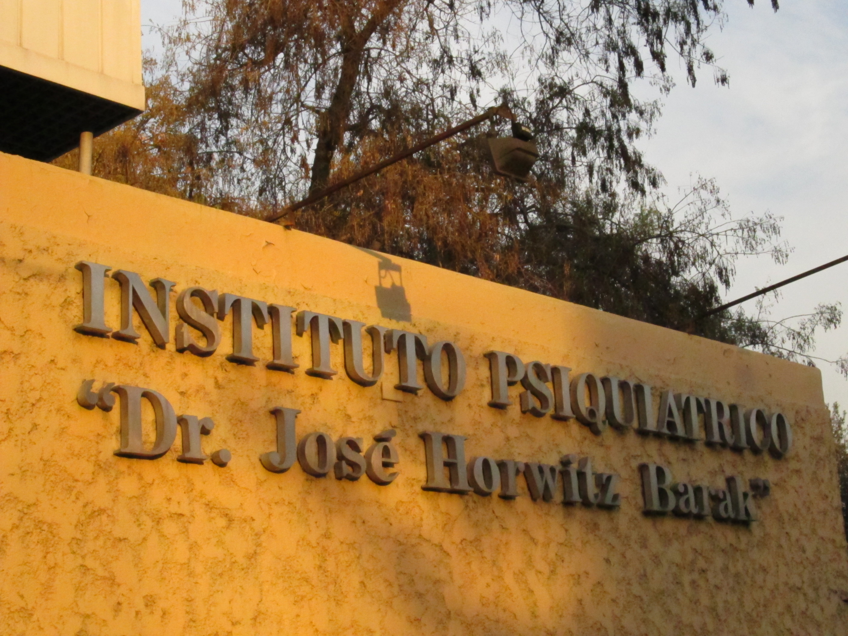 Hospital Instituto Psiquiátrico Dr. José Horwitz Barak, en Santiago de Chile.